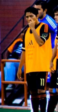 Mexico vs independiente de Medellin, partido de la seleccion mexicana jugado en el estadio Caliente de Tijuana, mas info videos y fotos en en: Javier Aquino Mexican soccer player. es: Javier Aquino jugador mexicano de futbol.